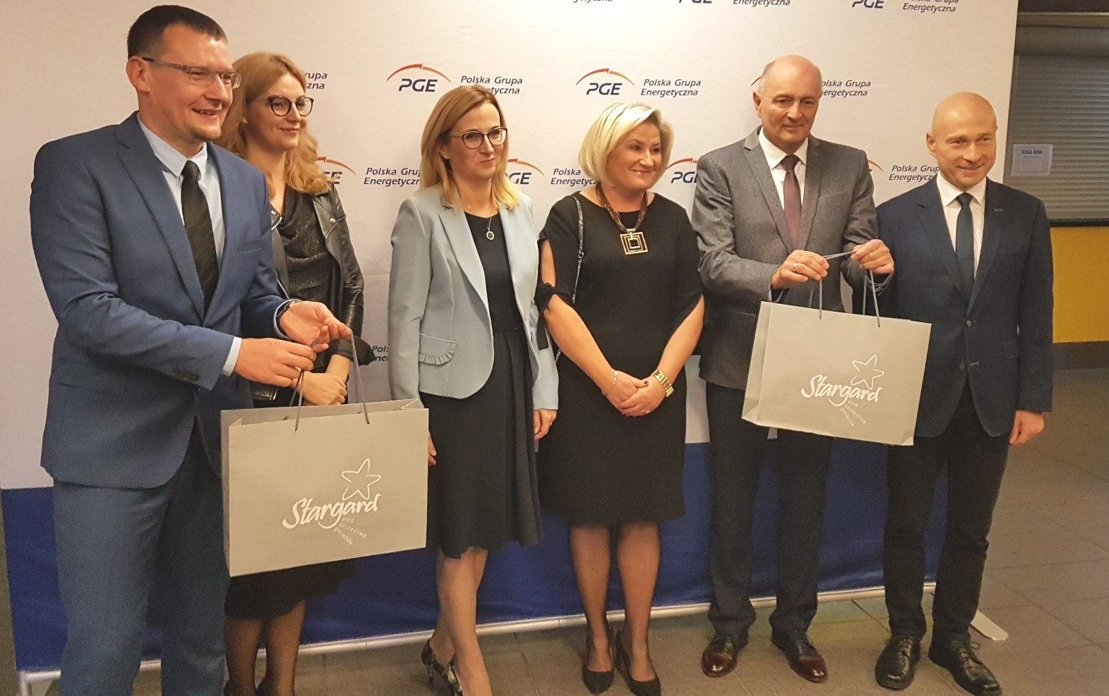 Jubileusz 70lecie, bankiet